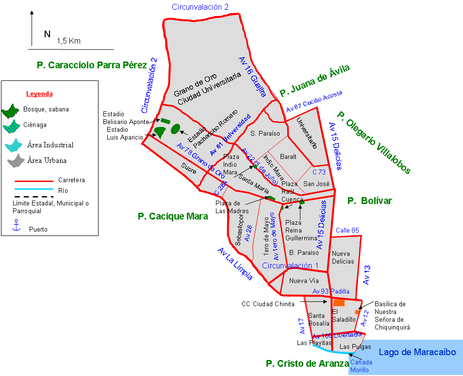 Mapa de la parroquia Chiquinquirá, municipio Maracaibo, estado Zulia, Venezuela